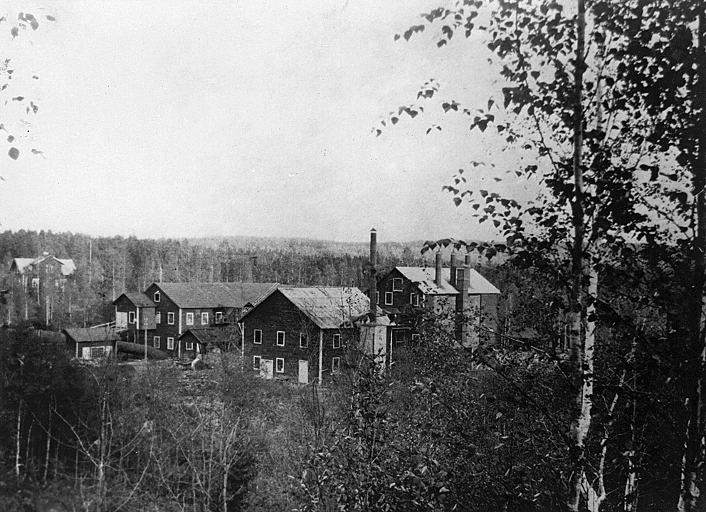 Oforsens träsliperi. Bildnr: SEVA_BAB66_14 Arkivbildare: Billerud AB